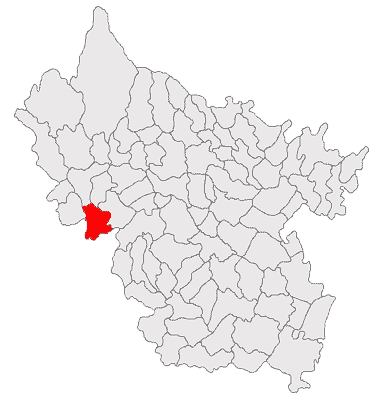 Categorie:Hărţi ale judeţului Buzău